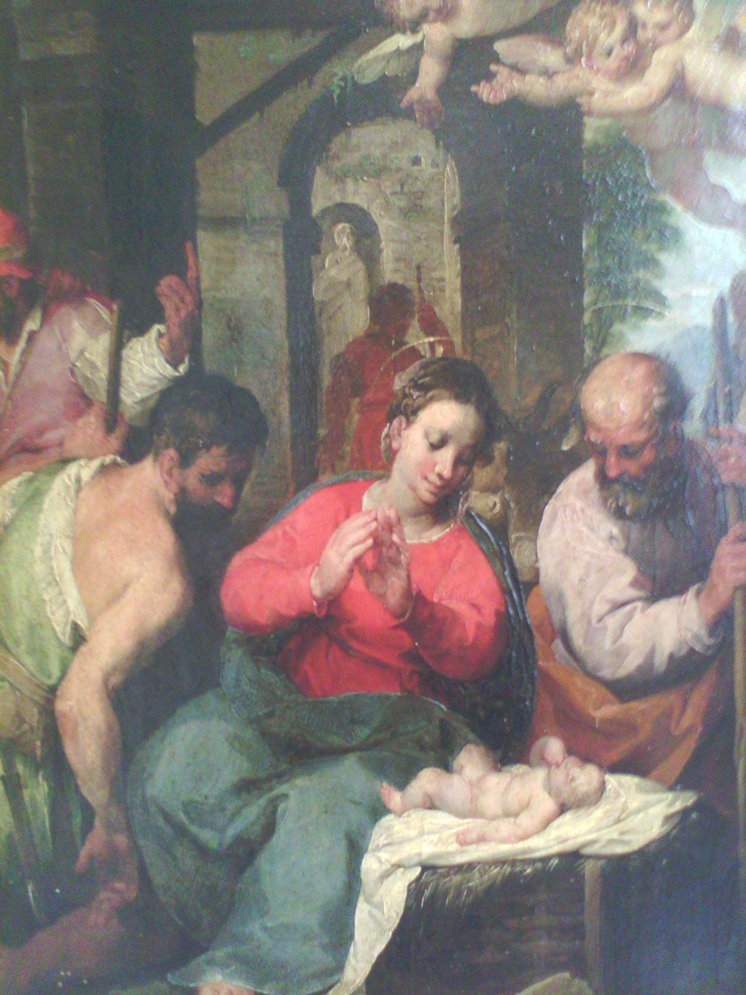 "Adorazione dei pastori" di Simone Barabino, esposta presso la galleria di Palazzo Bianco (Genova)